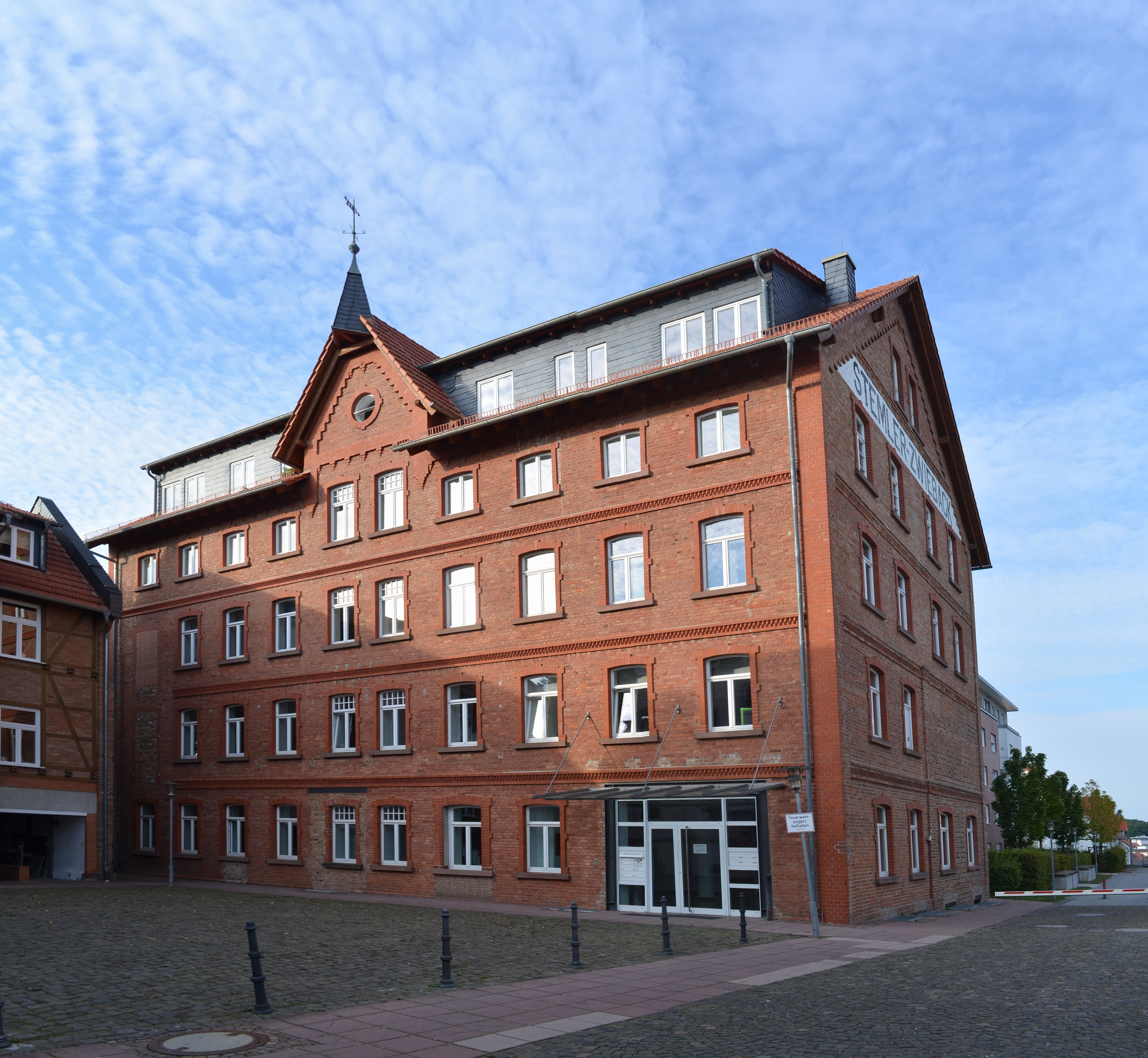 Friedrichsdorf, Wilhelmstraße 14a